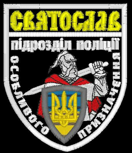 Шеврон батальйону "Святослав"